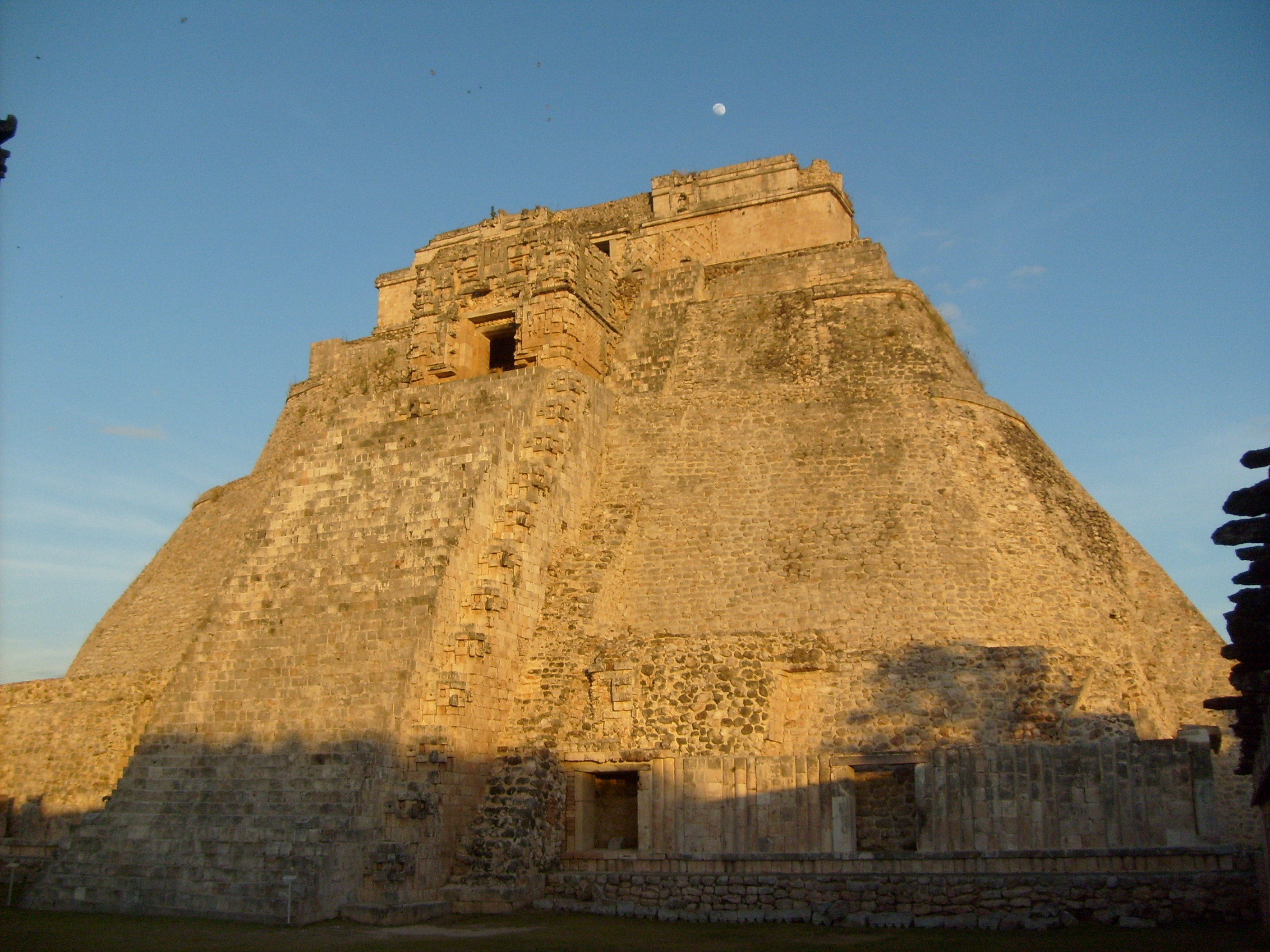 esta es una piramide muy chida